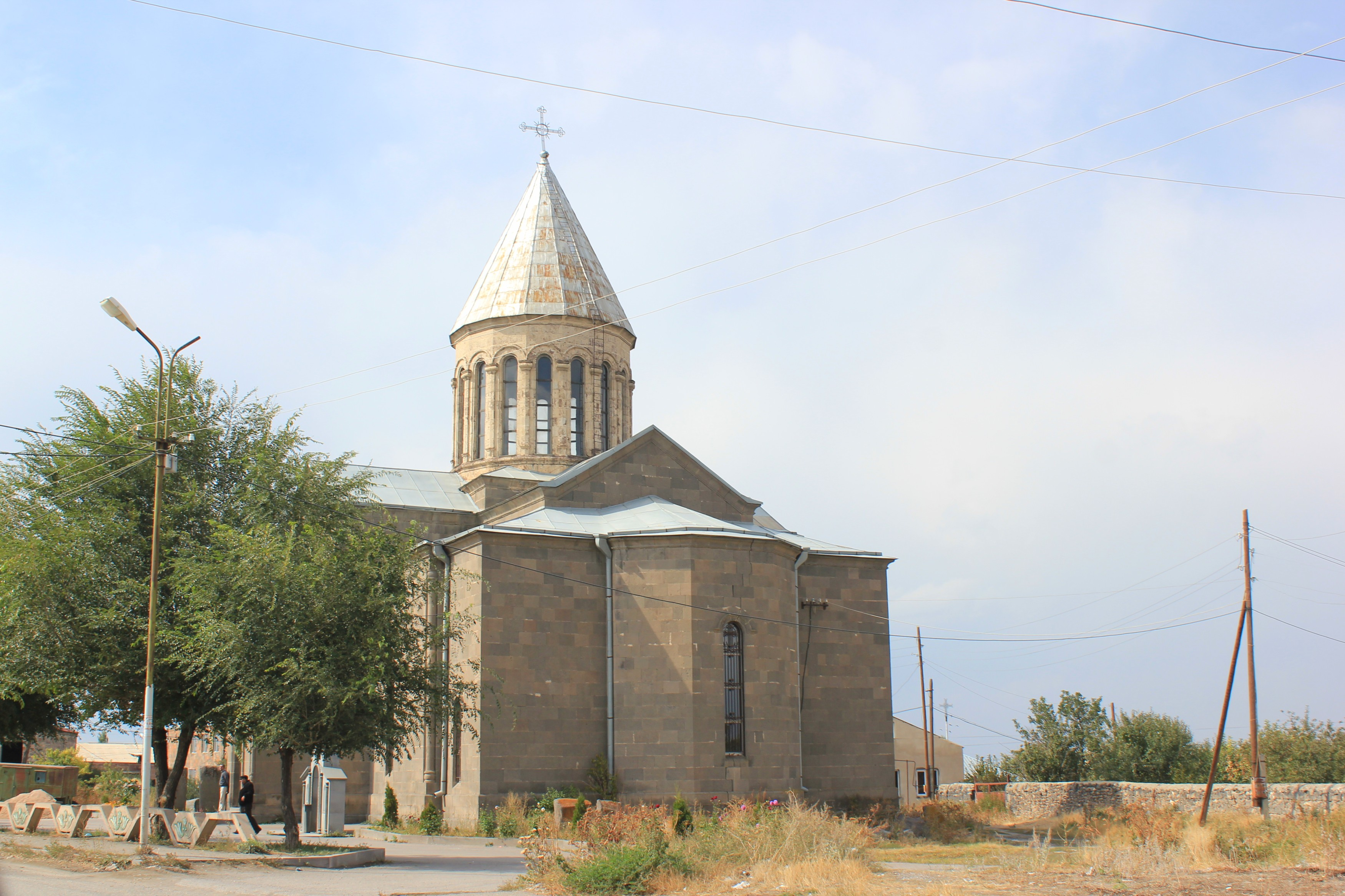 Kirche in Wardenis, Armenien.